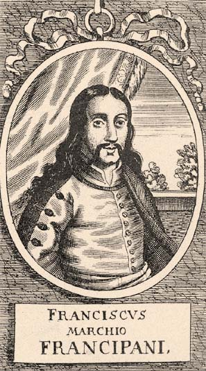 Őrgróf terszati Frangepán Ferenc Kristóf (horvátul Fran Krsto Frankopan; Bosiljevo, 1643. március 4. – Bécsújhely, 1671. április 30.) horvát főnemes, a Wesselényi-összeesküvés egyik vezetője.